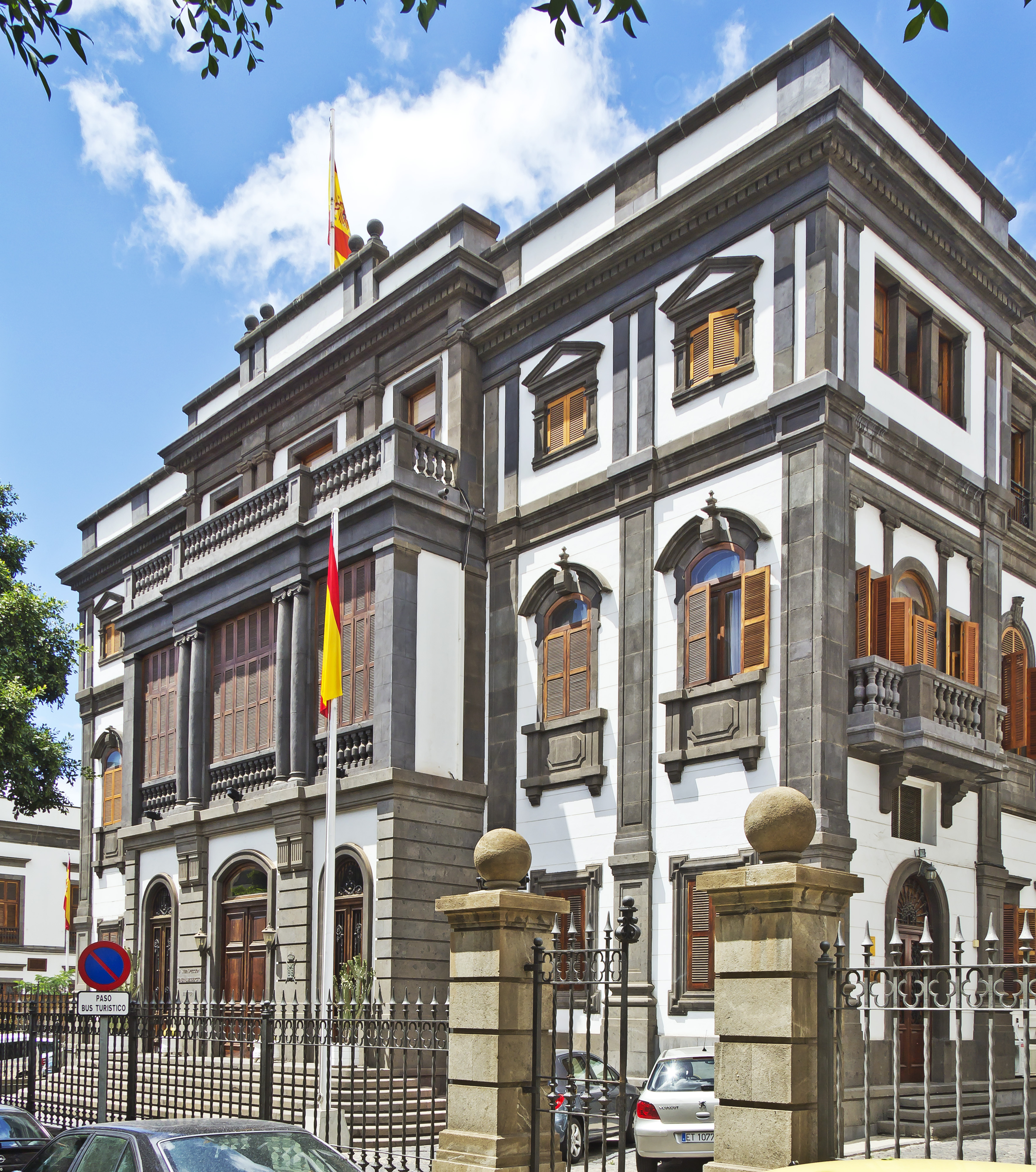 Das Gebäude des ehemaligen Gobierno Militar an der Rambla 25 de Julio wurde 1928 von José Rodrigo Vallabriga entworfen. Heute (2013) befindet sich dort die Jefatura de la 5ª Subinspeccion General de Ejercito.